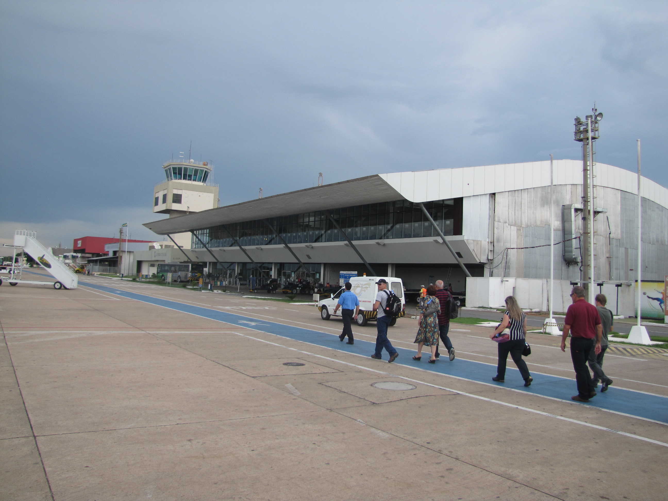 Aeroporto Internacional Marechal Rondon, MT.